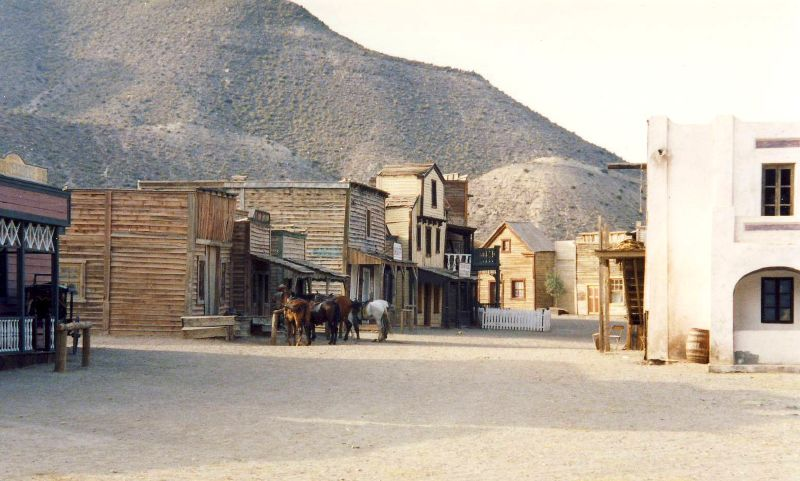 Décors du film Le Bon, la Brute et le Truand